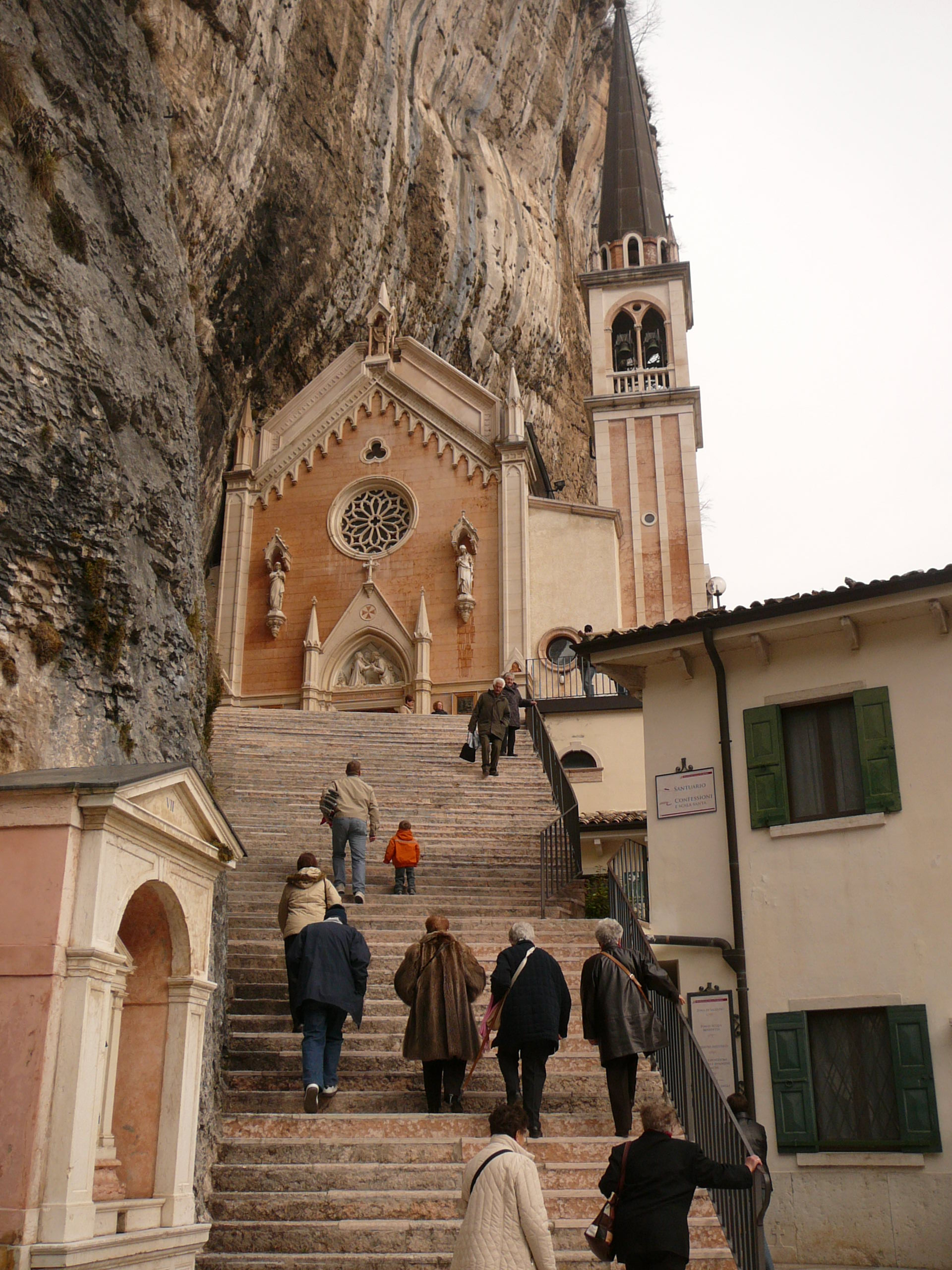 L'ingresso della chiesa del Santuario della Madonna della Corona